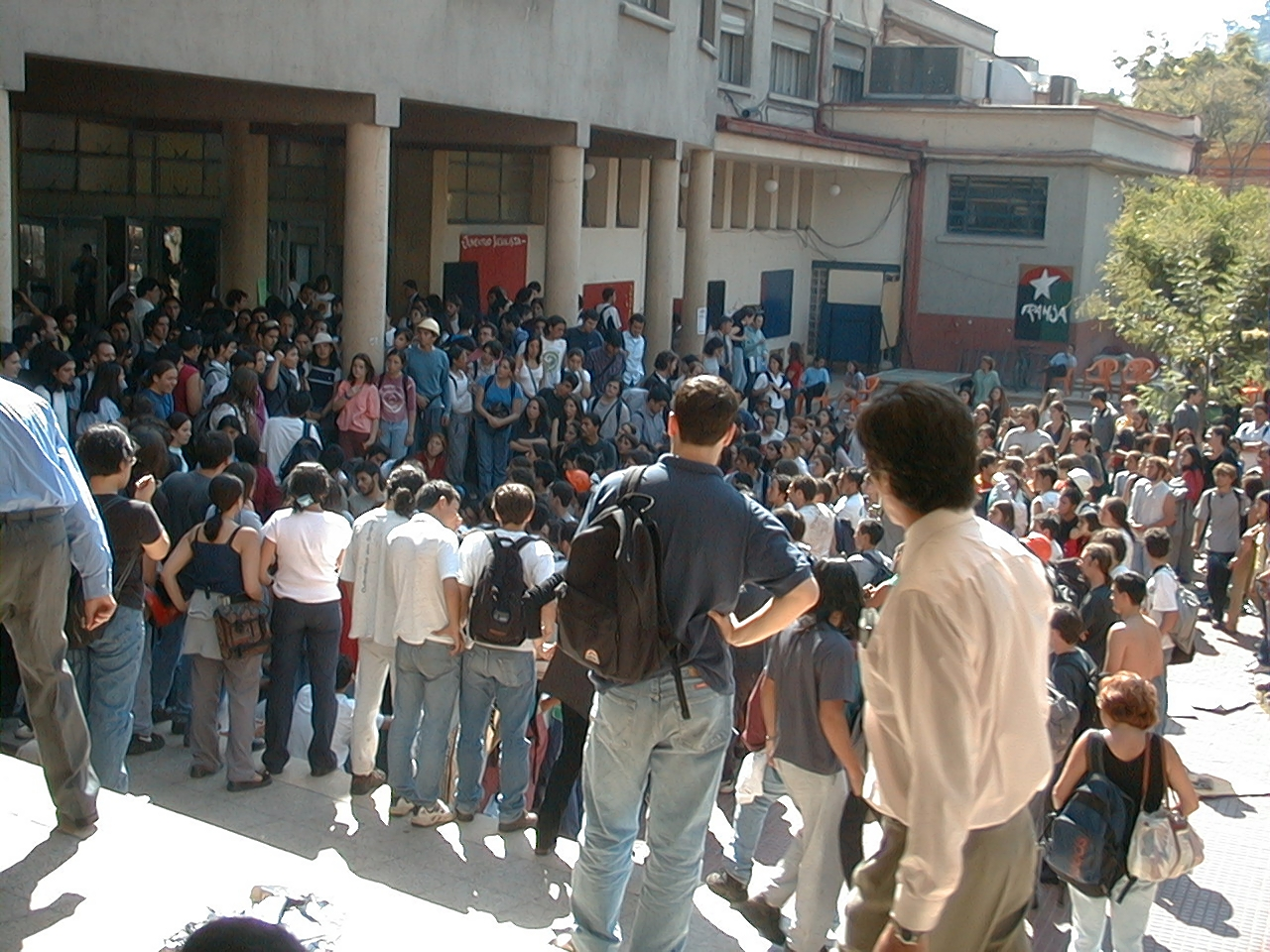 El 23 de marzo del 2000, se realizó la tradicional "guerra del puente" entre la Facultad de Ciencias Físicas y Matemáticas y la Facultad de Derecho de la Universidad de Chile. La cantidad de contusos y la magnitud de los destrozos selló la suerte de esta actividad interfacultades: fue la última que se hizo.